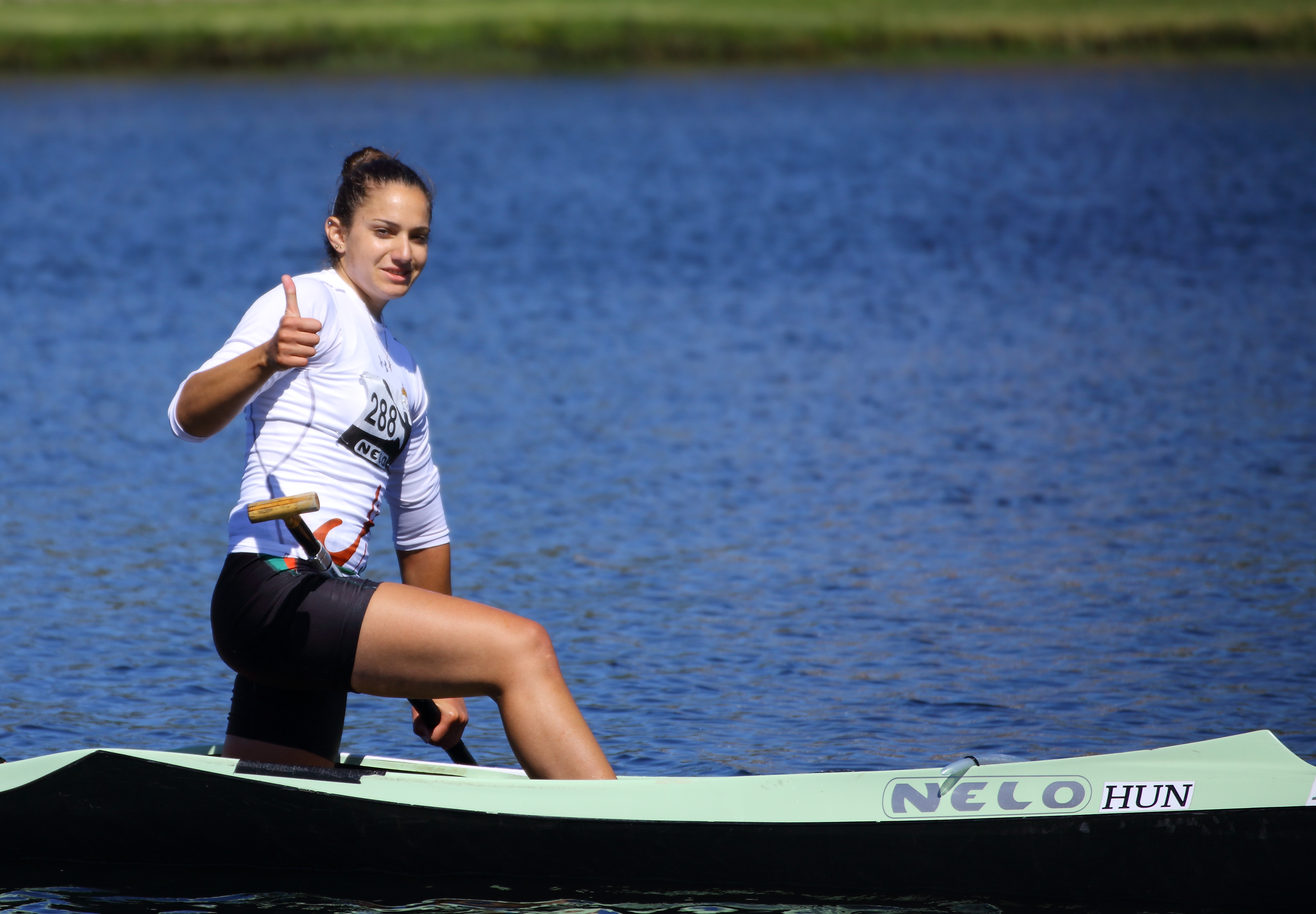 Ponte de Lima - MISKOLCZY Fruzsina (HUN)